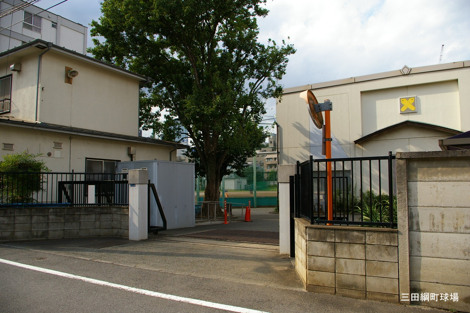 2009.5日本国内で塾生 (talk)が撮影。